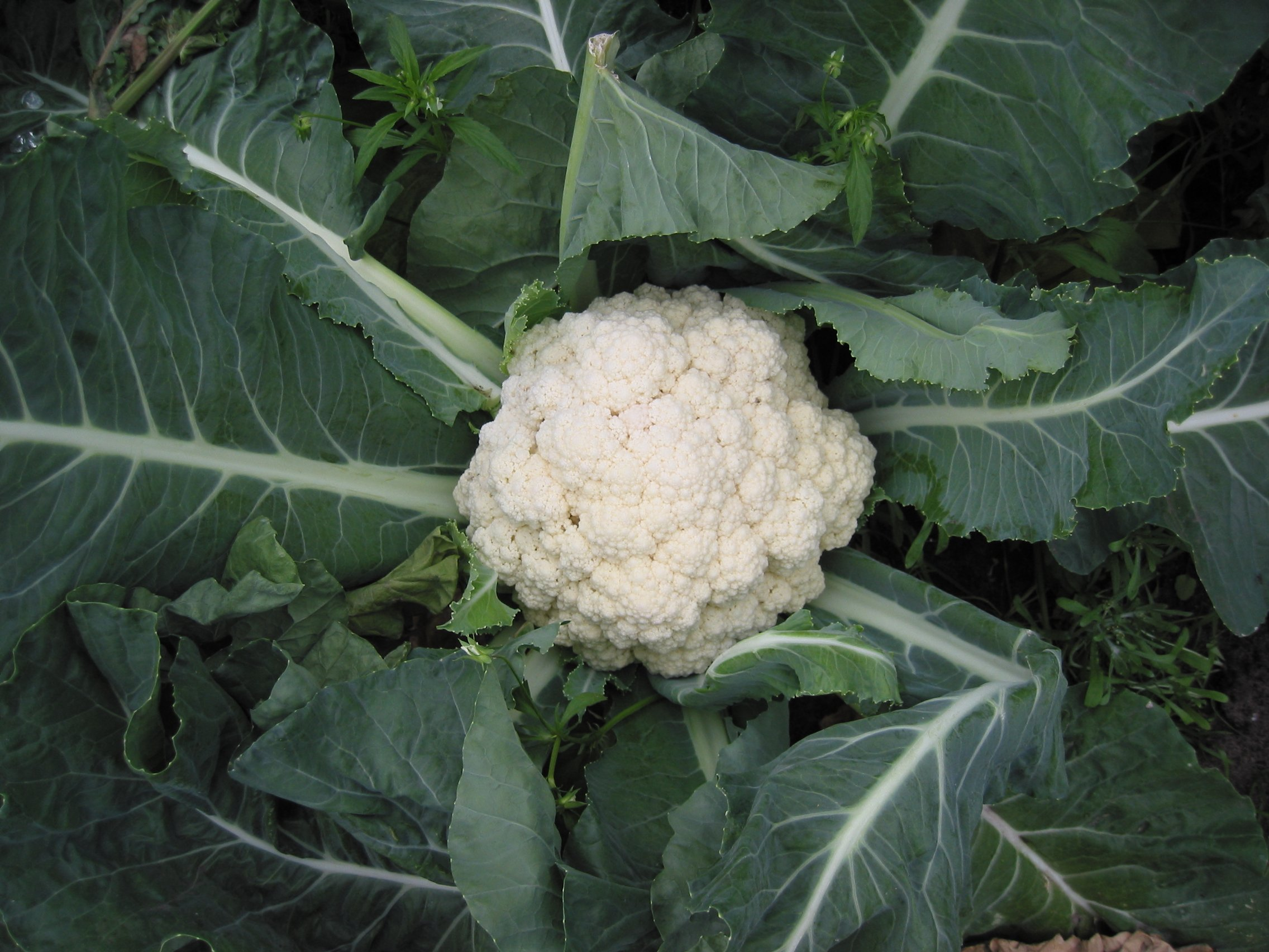 Bloemkool